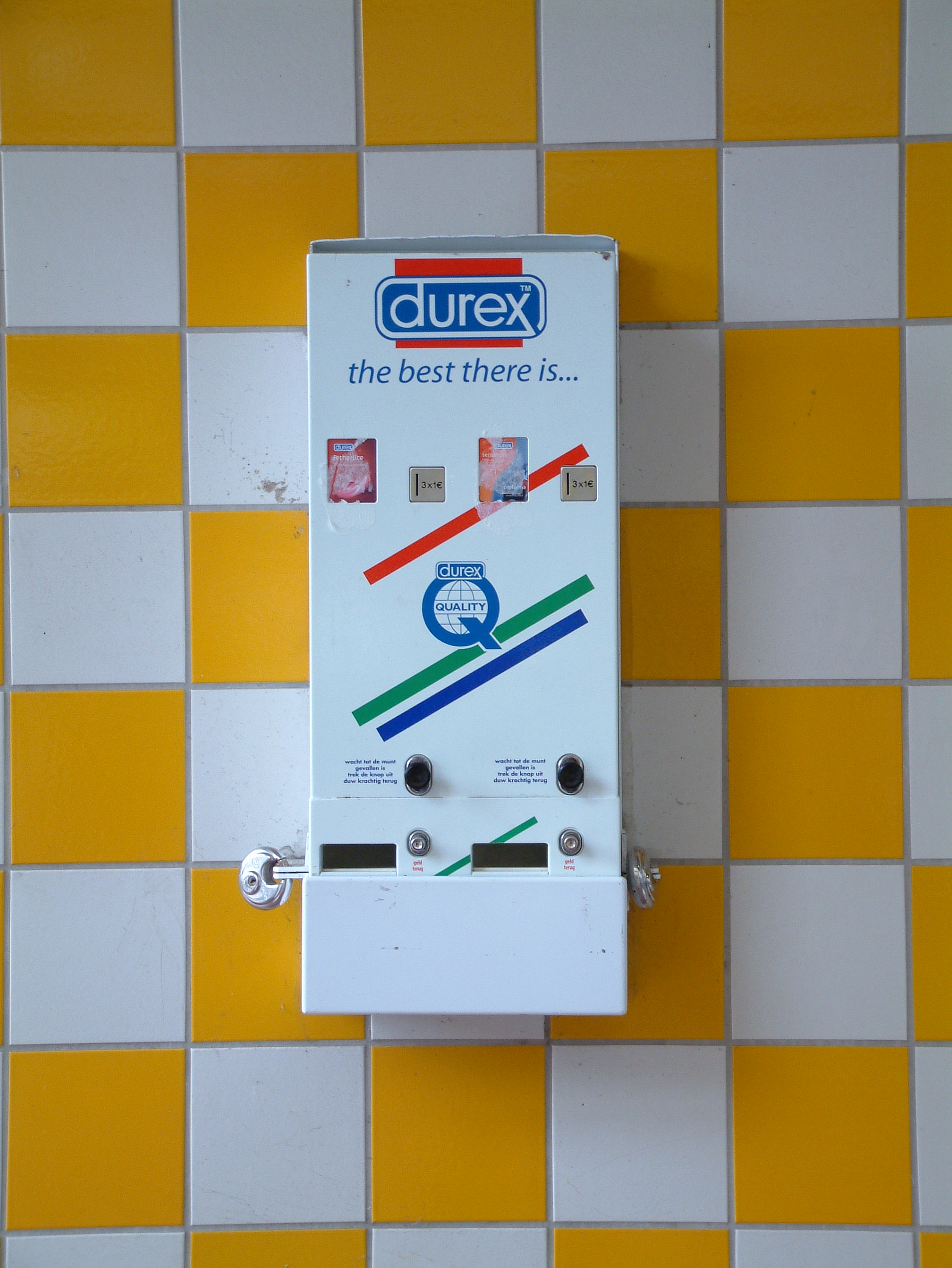 Condoomautomaat op het Stadhuisplein in Zoetermeer